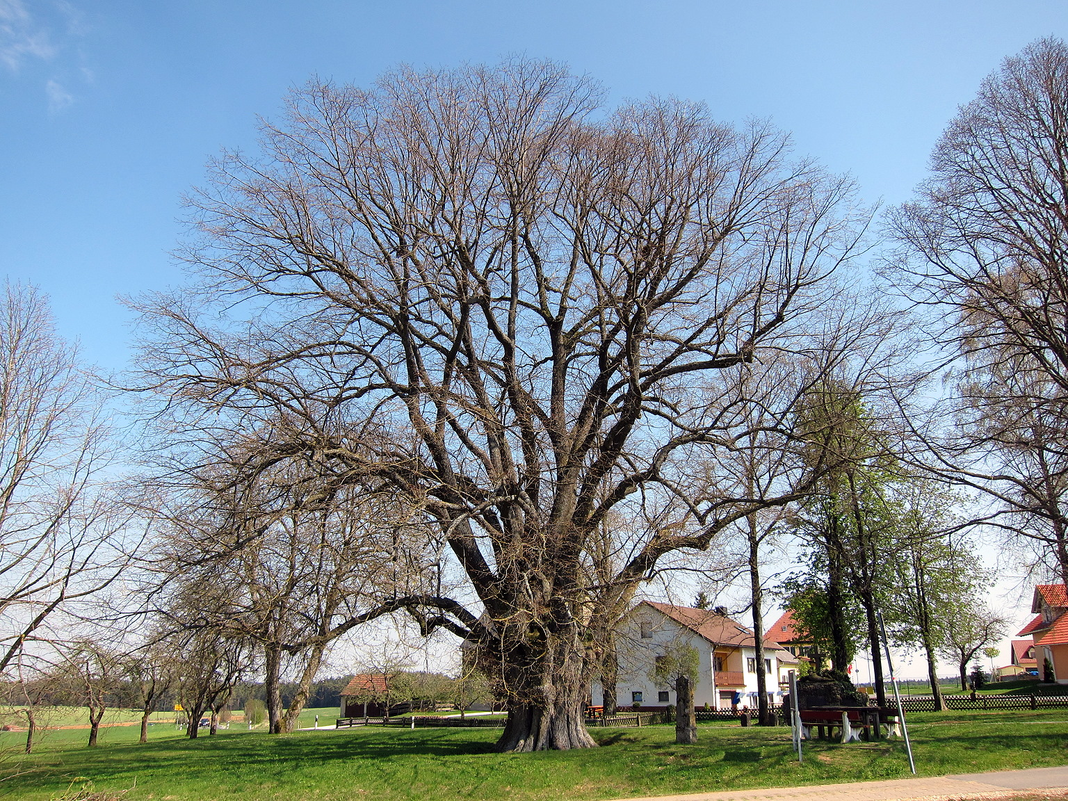 Russenlinde